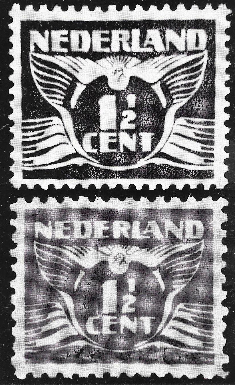 Britische Kriegsfälschung der niederländischen "Möwen-Marke" aus dem Jahr 1941. Oben das Original, unten die PWE-Fälschung.